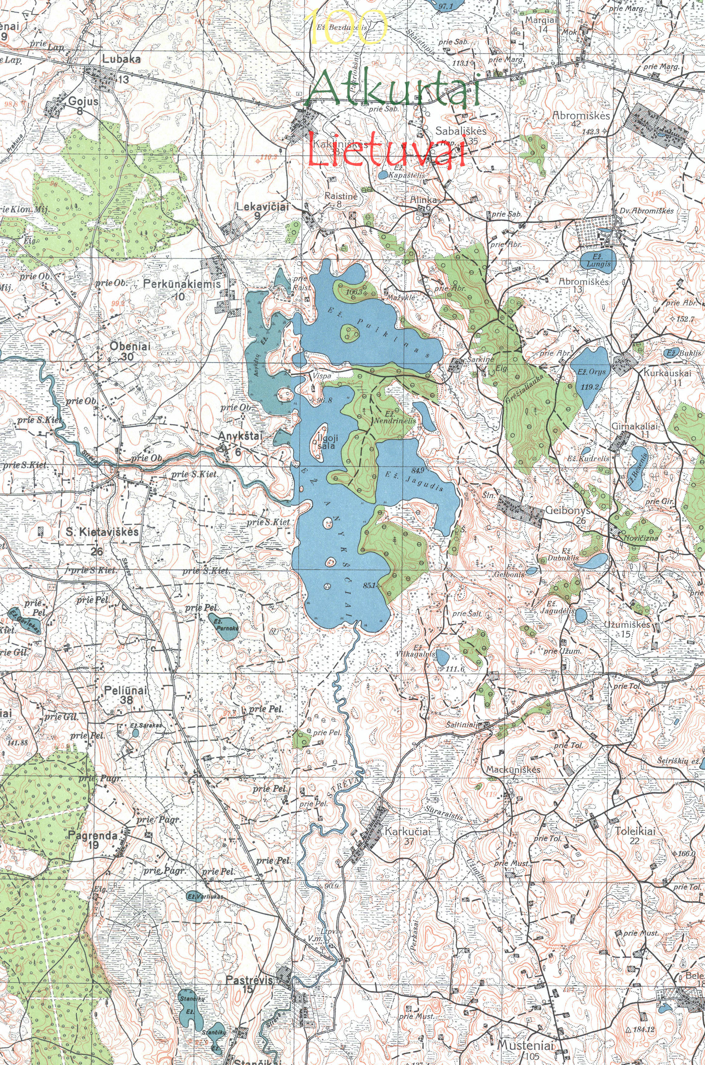 Vietovė 1936m prieš susikuriant Elektrėnams ir užtvenkiant Strėvos upę. Elektrėnų marių priešistorė